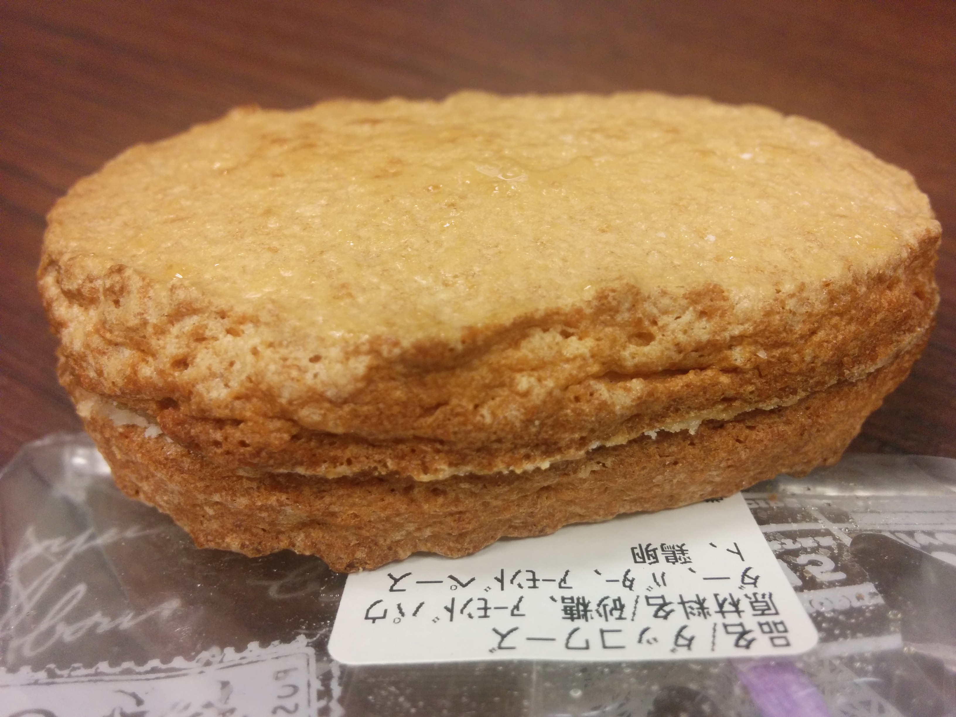 ダッコワーズ